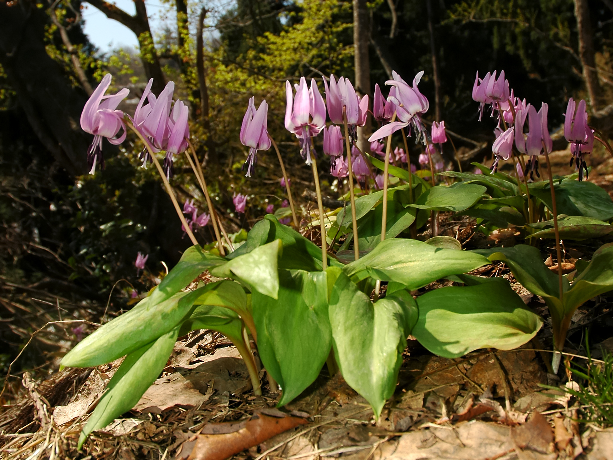 Erythronium japonicum (Katakuri, カタクリ)